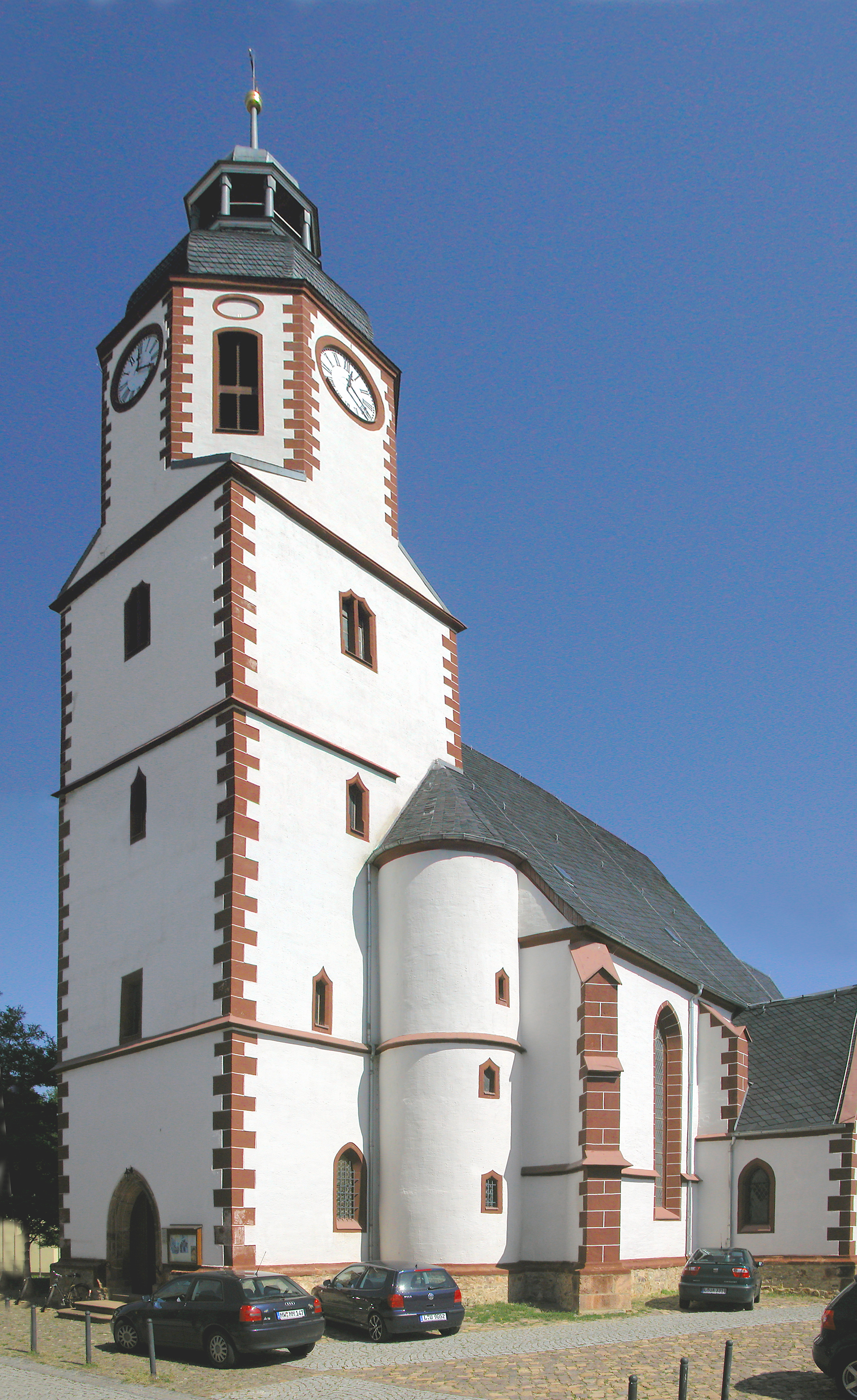 01.09.2009 04654 Frohburg: Ev. St. Michaeliskirche, Kirchplatz. Dreischiffige Hallenkirche, Spätgotik., 15. Jh., Chor um 1425. [DSCN38718-38719.TIF]20090901190MDR.JPG(c)Blobelt